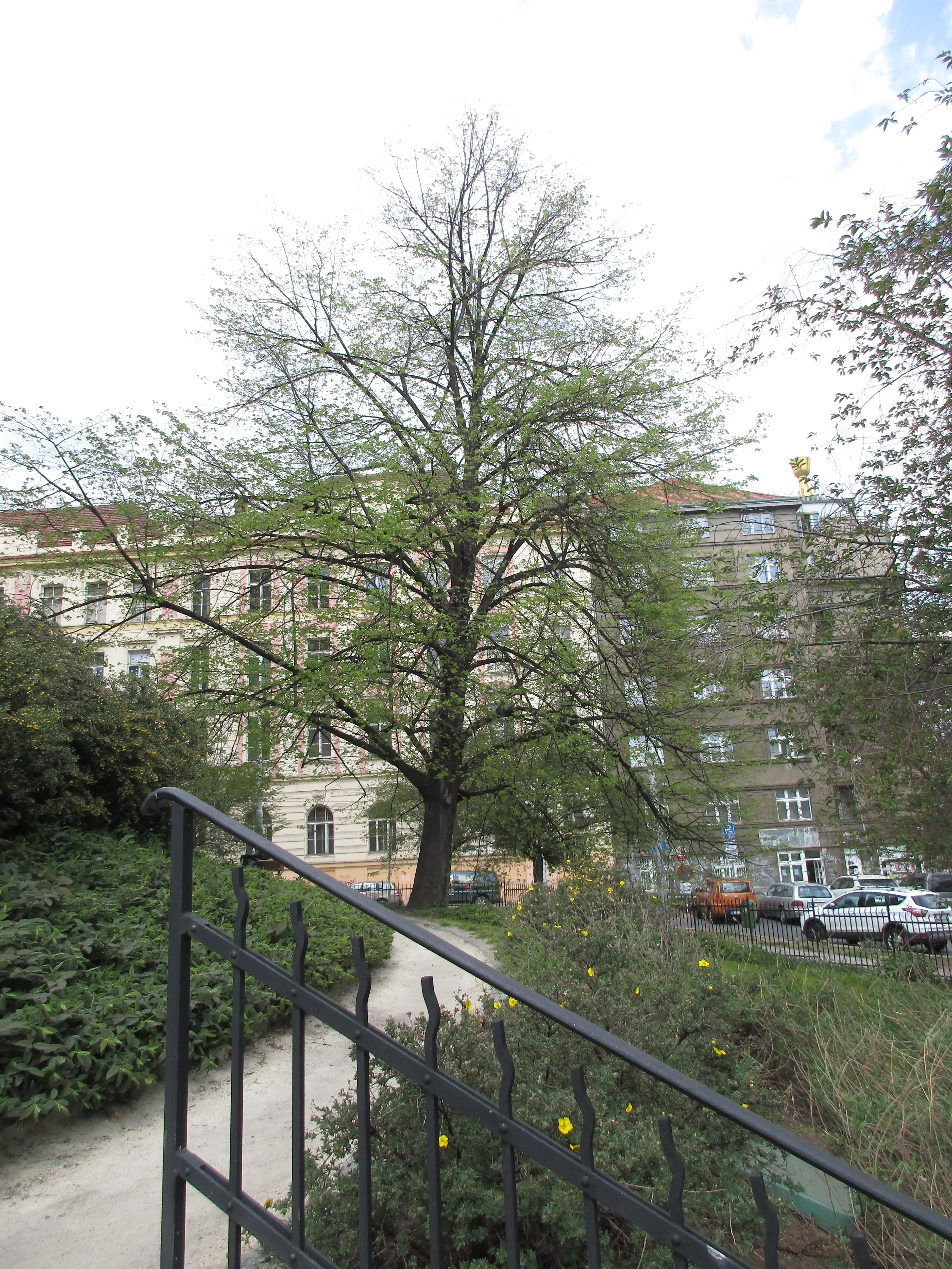 Lípa malolistá (Tilia cordata). Praha 7 - Holešovice, Strossmayerovo náměstí. Vysazena 28. října 1968 k 50. výročí vzniku Československé republiky. Významný strom, evidenční číslo MHMP: 65, v databázi od roku 2015.